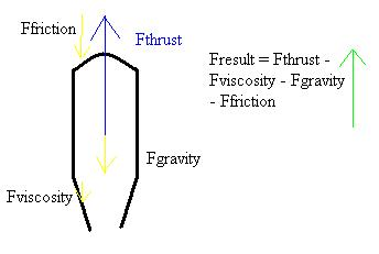 De krachten die werken op een waterraket